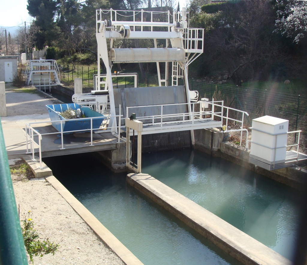 La vanne de contrôle de l'embranchement ouest des Trois-Lucs (Marseille 11e arr.) du canal de Marseille. Ce système de vanne coulissante est la forme moderne des anciennes martelières.